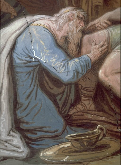 Priamus, Felice Giani, Palazzo Milzetti, Faenza.